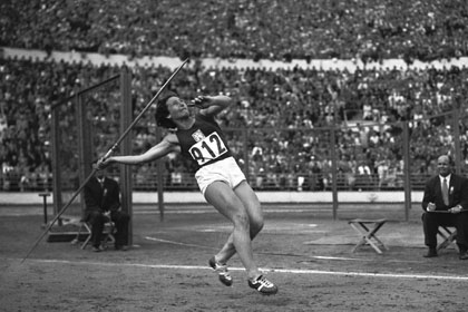 Dana Zátopková at the 1952 Olympics